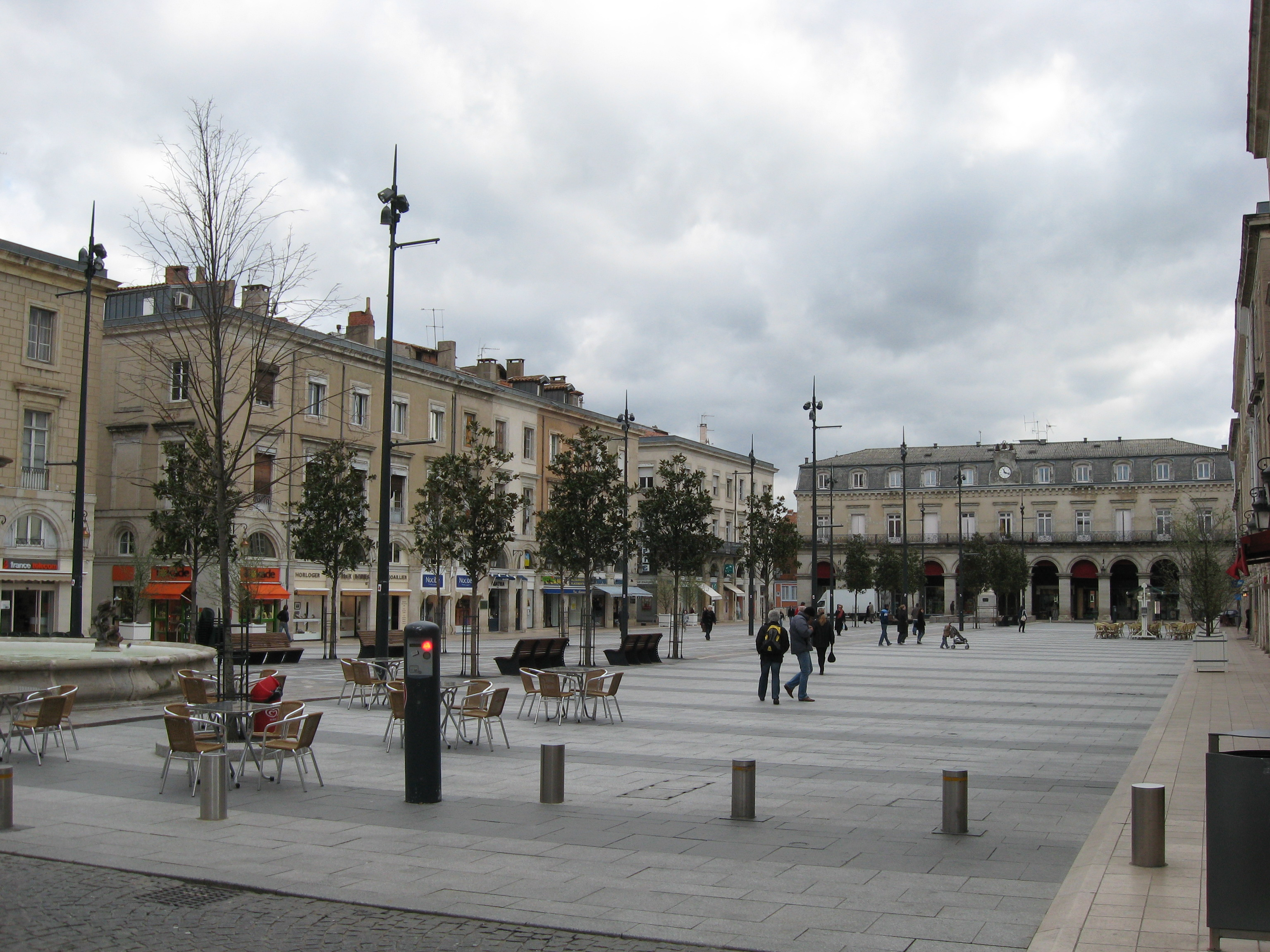 La place Jean-Jaurès à Castres